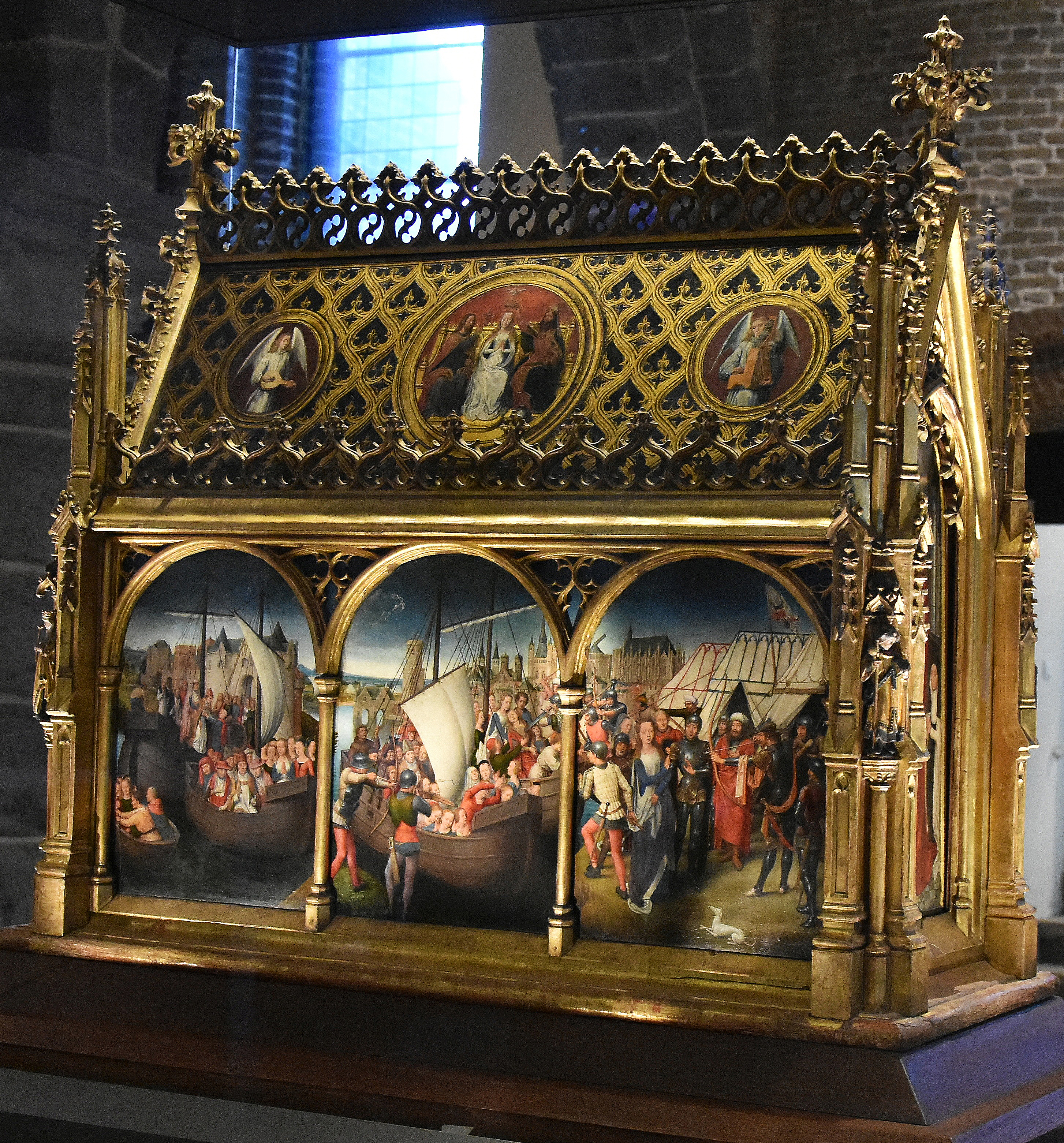 Ursulaschrijn Sint-Janshospitaal (Brugge) 16-08-2019 11-47-32 This photo of movable heritage has been taken in the Flemish Region